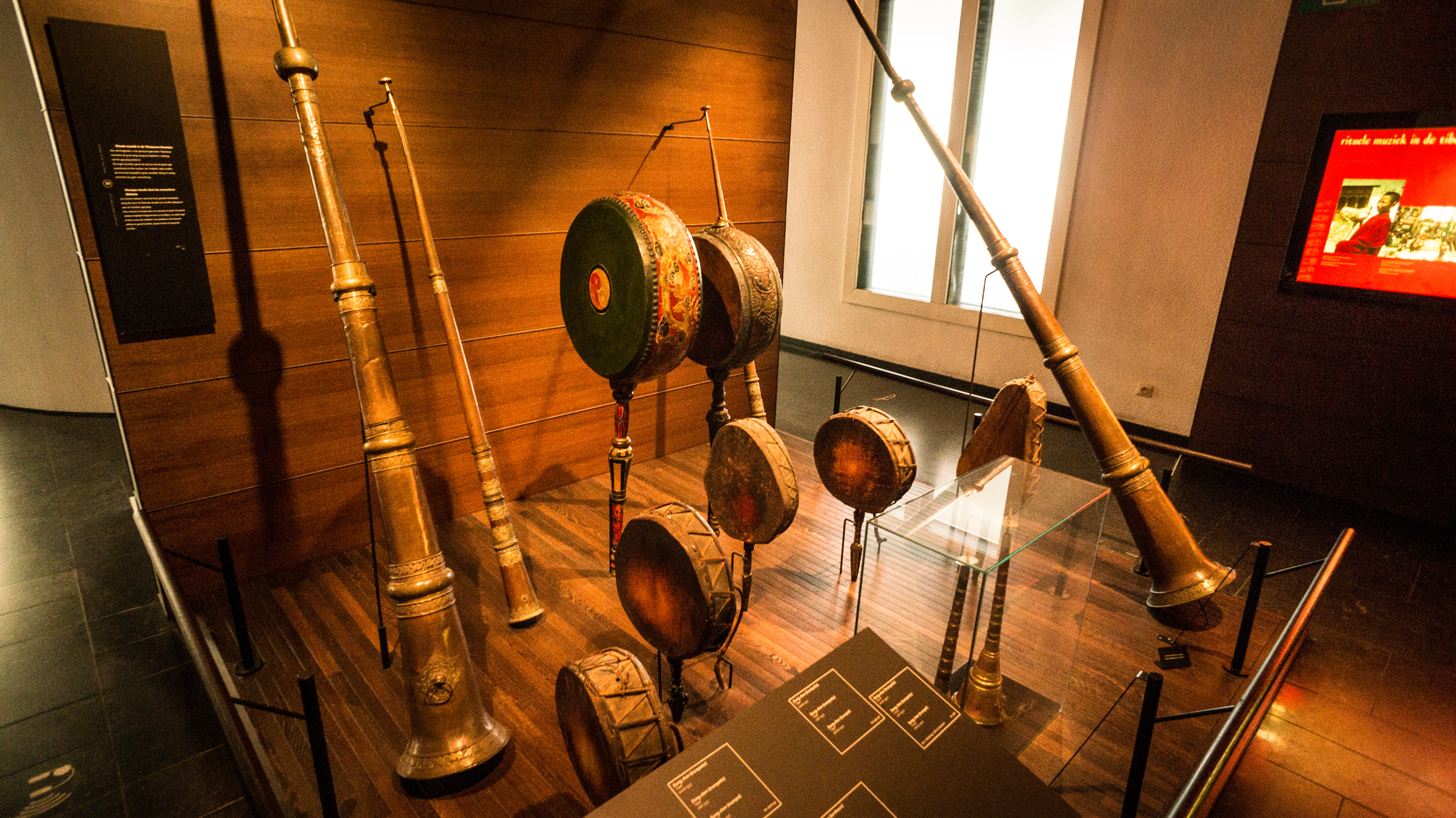 2015-05-302771.jpg